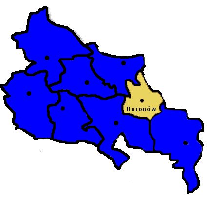 Map of Boronów in powiat lubliniecki Author: Przykuta Date: 2005